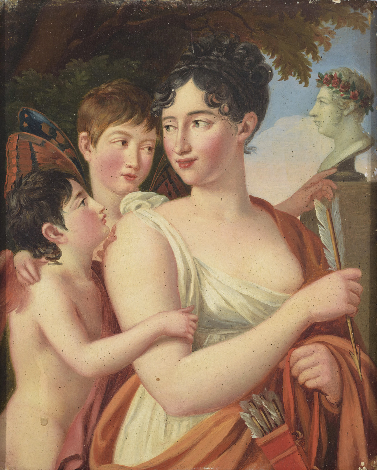 Josefa Tudó, I Condesa de Castillo Fiel, con sus hijos Manuel y Luis Godoy, junto a un busto de Manuel Godoy.